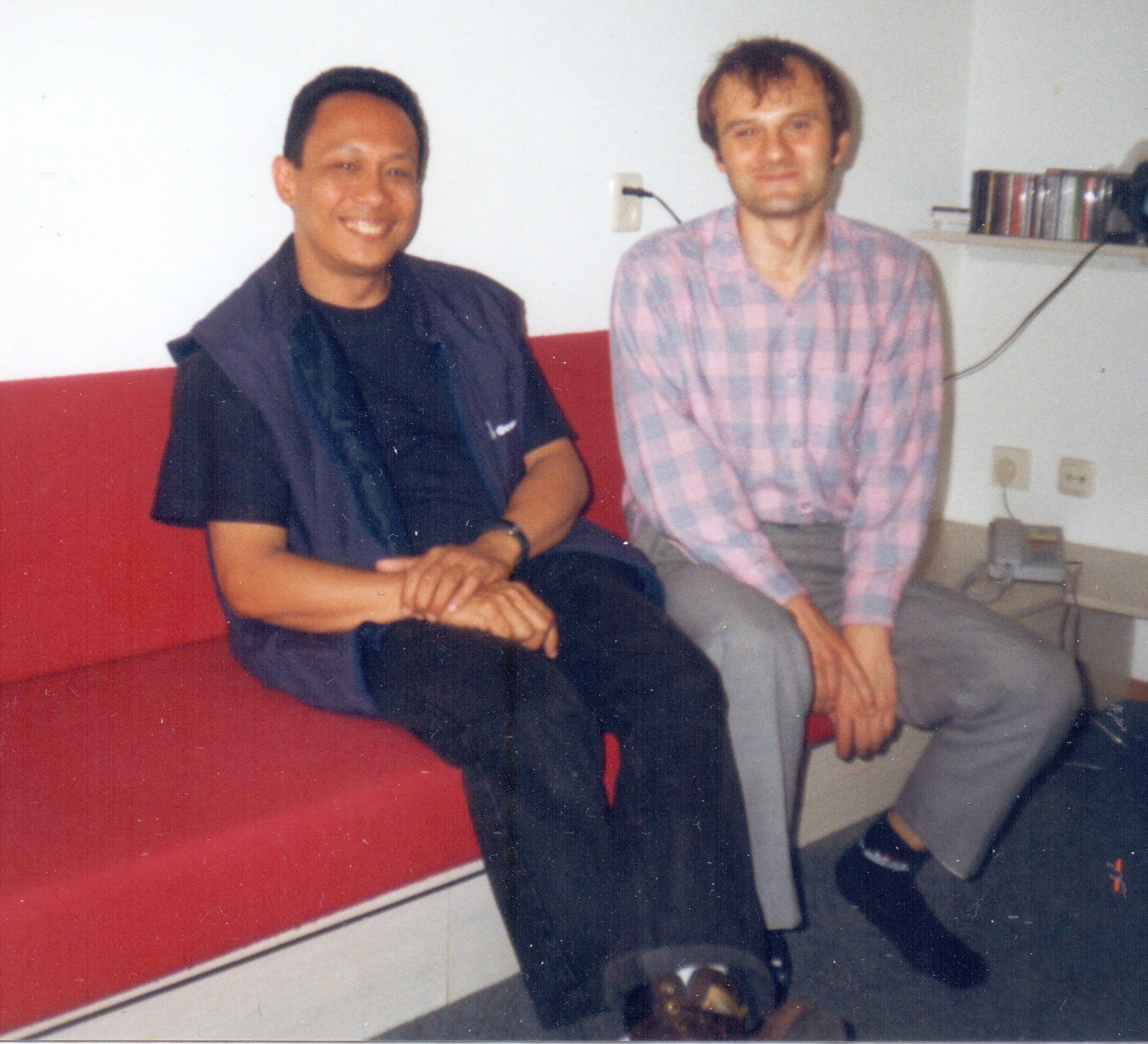 dr Janusz Gwoździewicz, Amstelveen, Laan van Kronenburg 9 /409, akademik